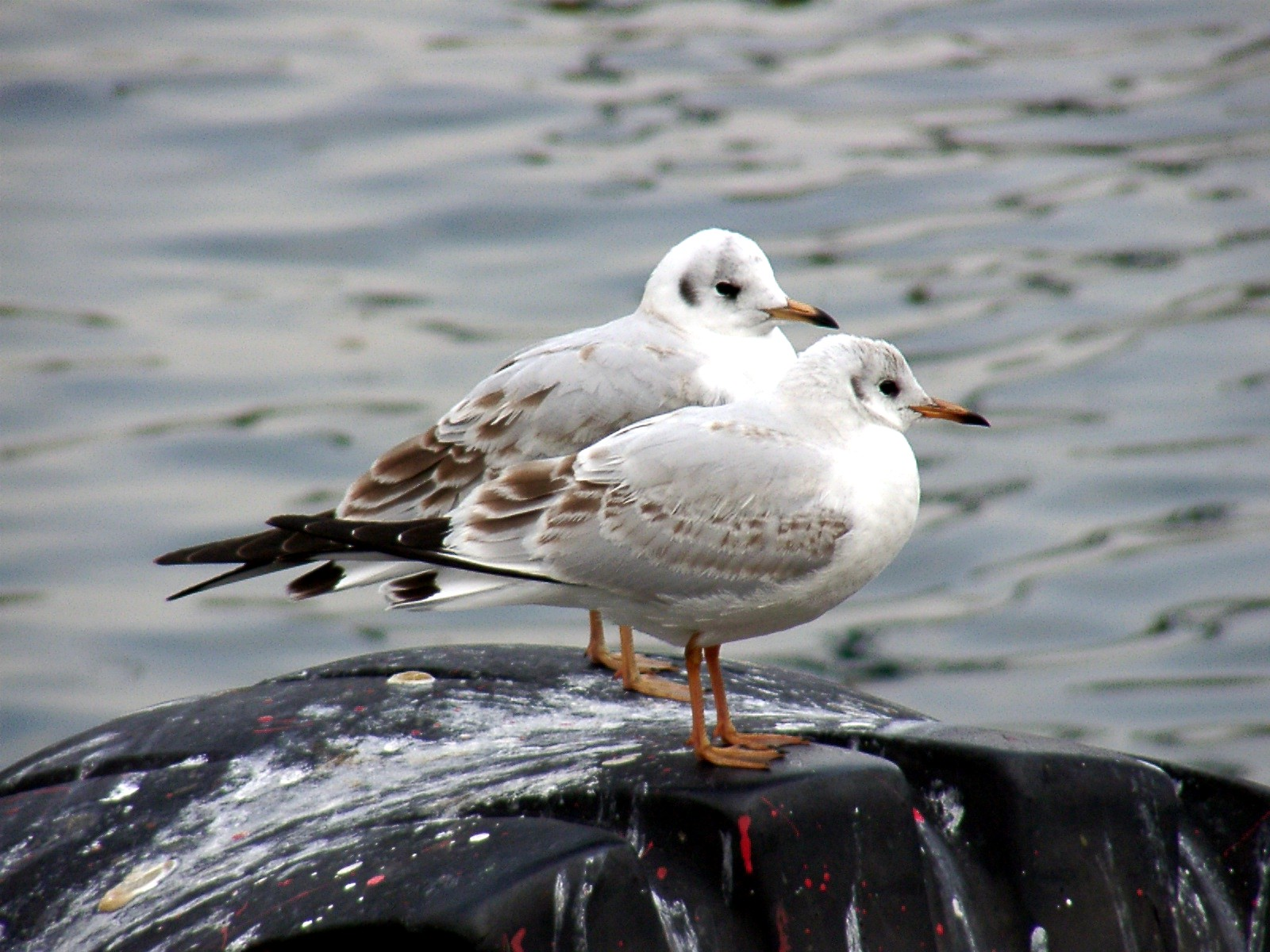 ユリカモメ（学名：Larus ridibundus）